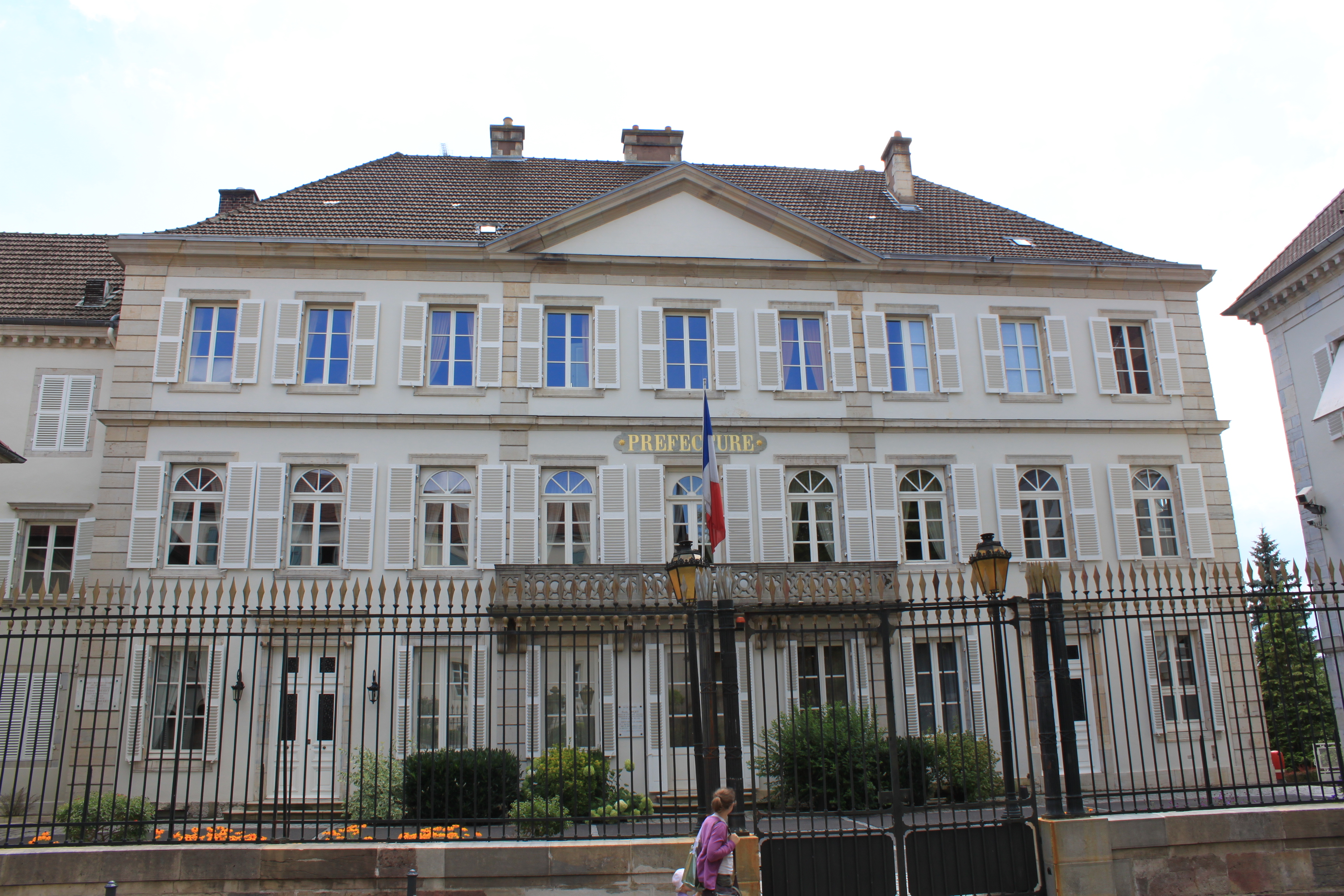 Vesoul, Haute-Saone, Franche-Comté, France